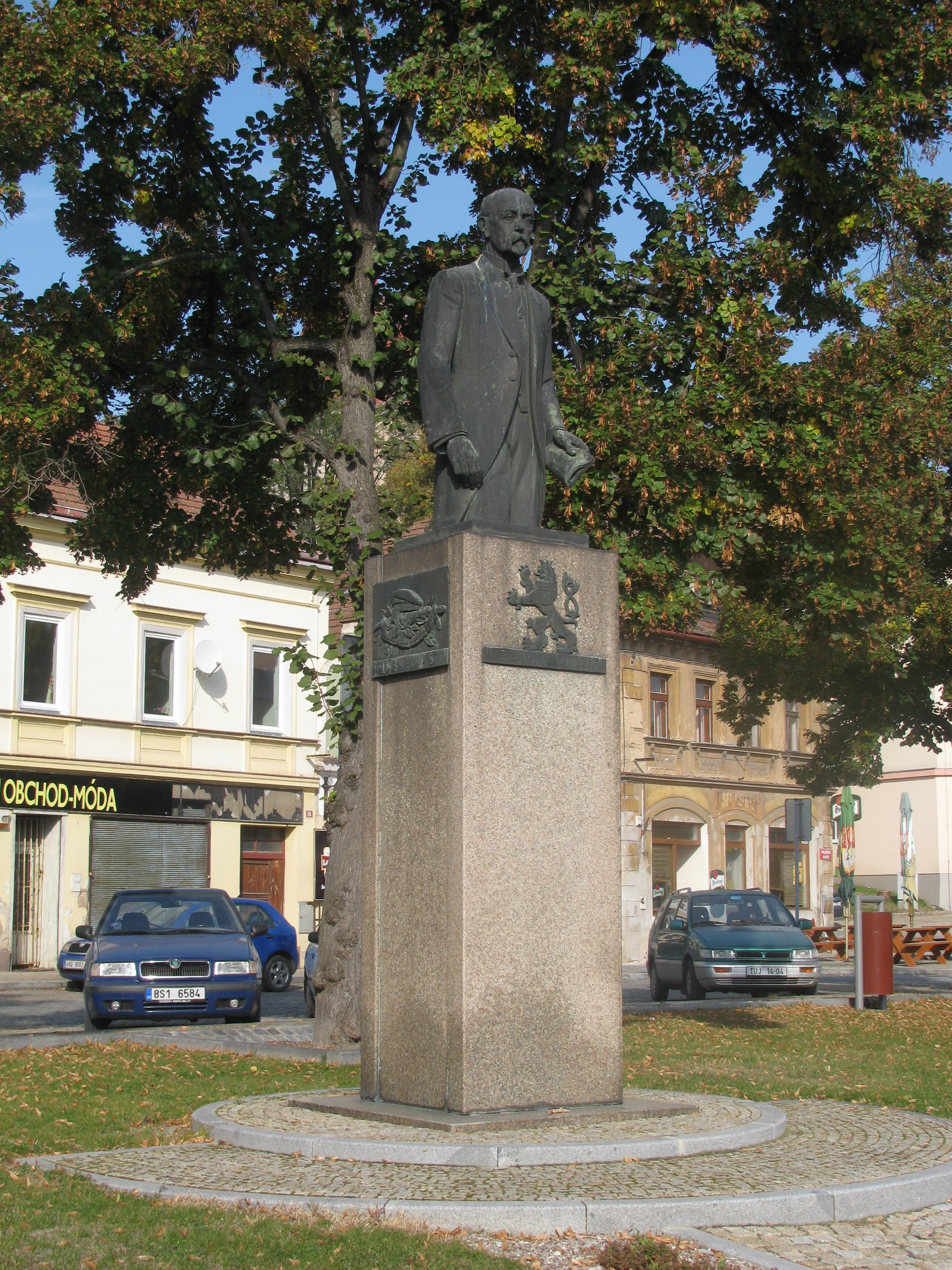 Pomník T. G. Masaryka v Dobrovici, Palackého nám., horní část